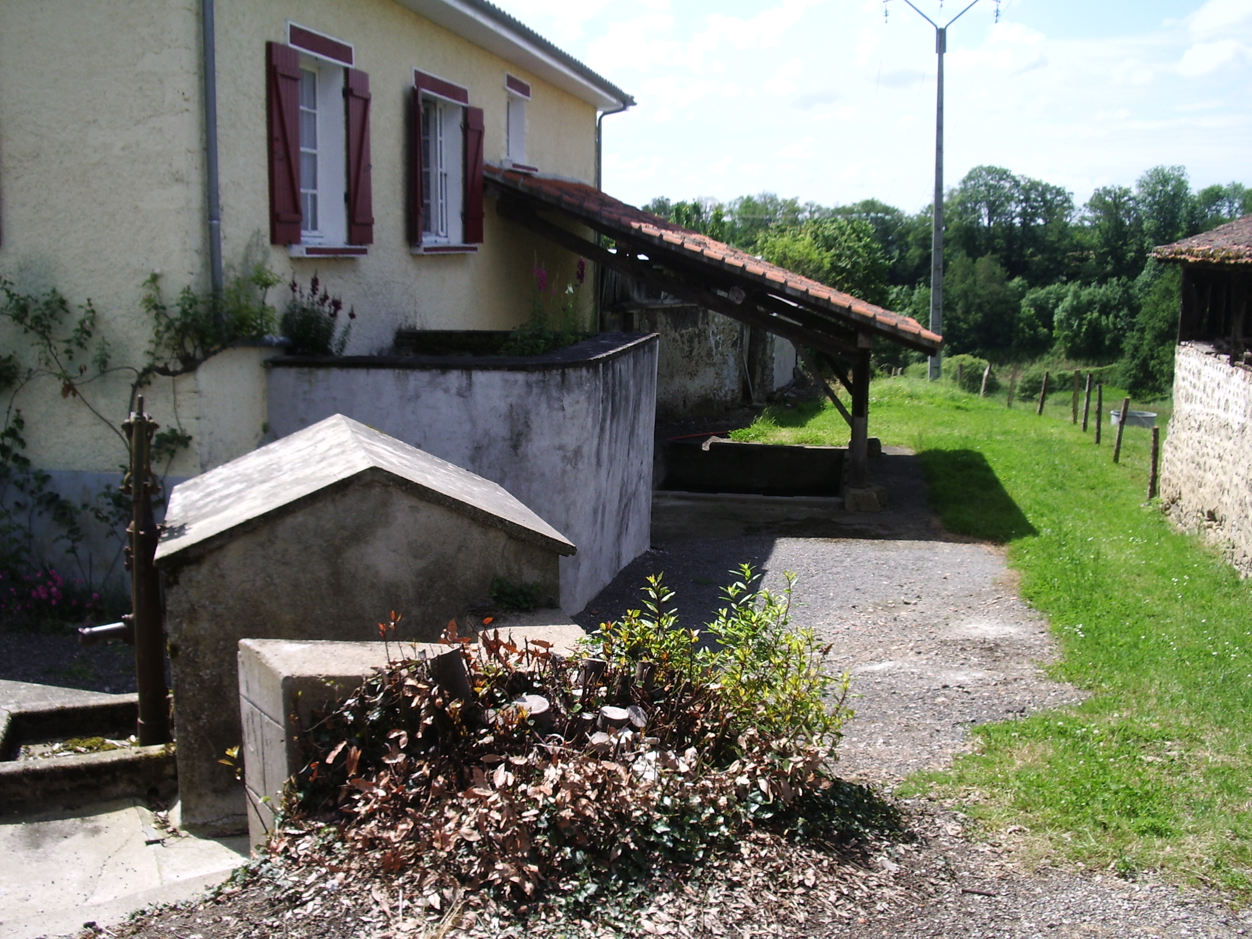 Fontaine Saint-Martin et lavoir, Pressignac (Charente, France)